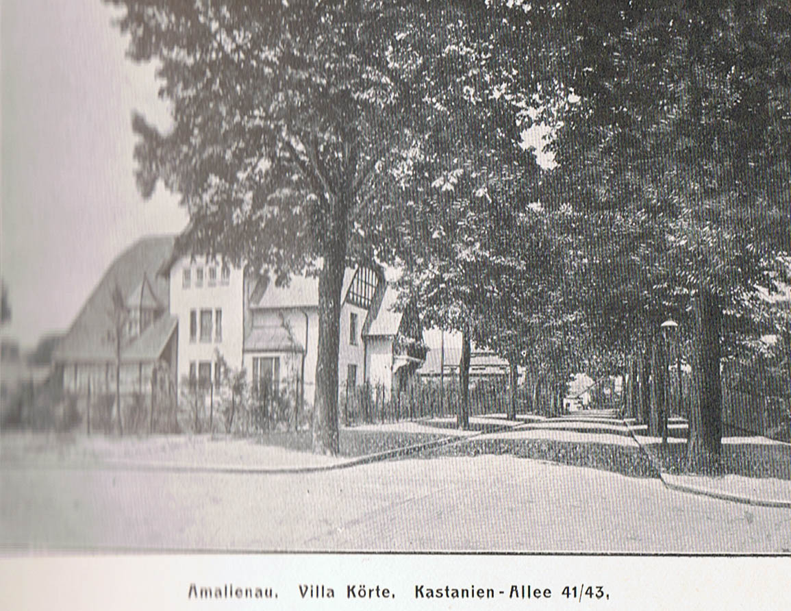 Fotografie der Villa von Siegfried Körte im Königsberger Stadtteil Amalienau.